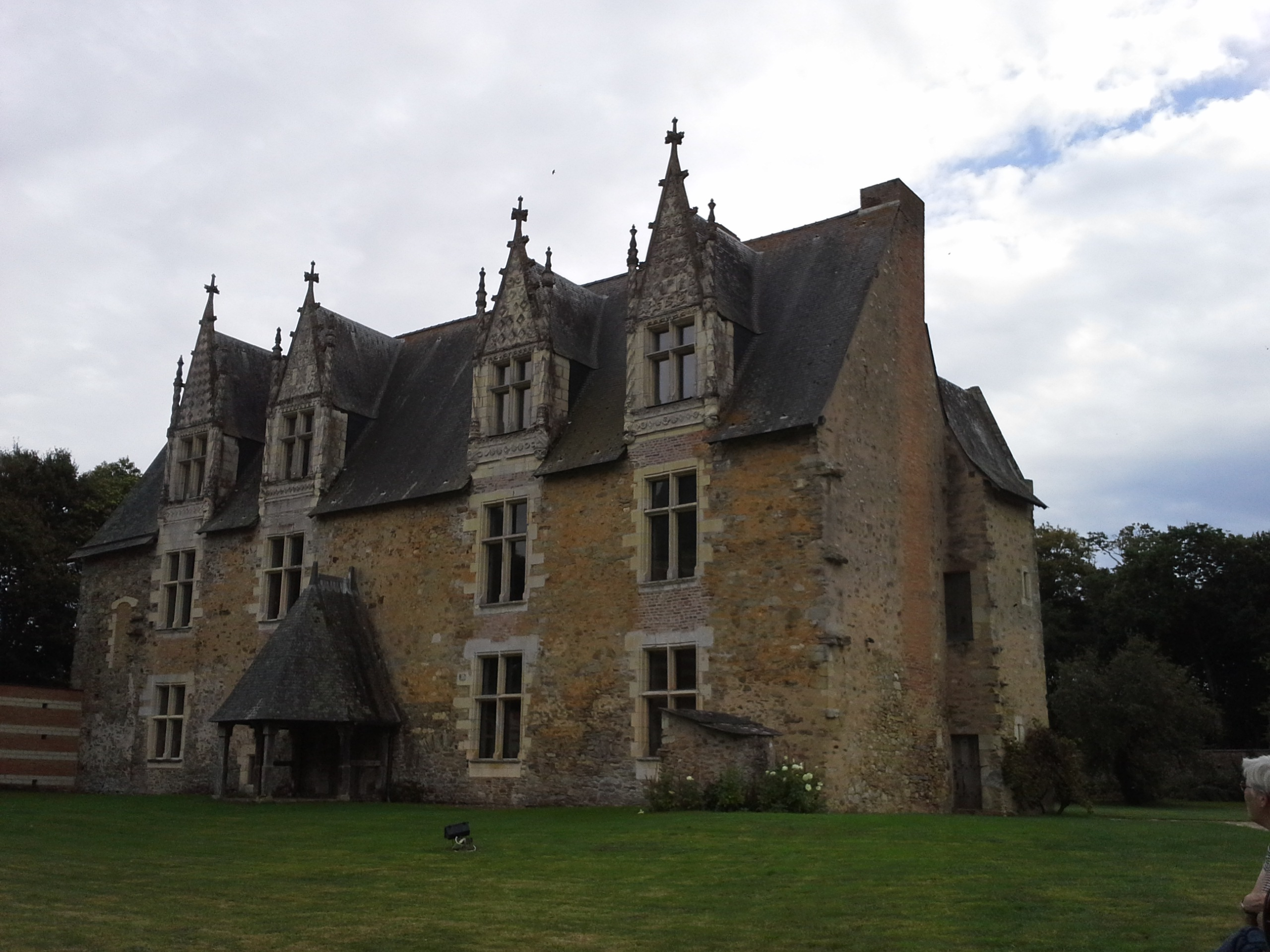 Logis du Château de Mortiercrolles